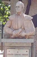 Monumento a ignacio sanchez mejias